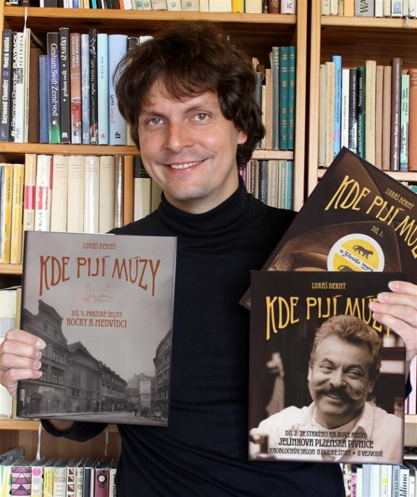 Snímek spisovatele Lukáše Berného se třemi díly edice Kde pijí múzy.